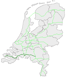 Locatie E312 (A58 Ehv-Vs), zelf gemaakt